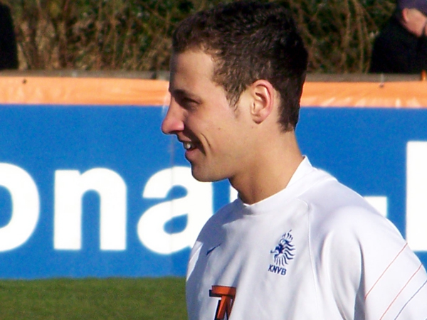 Roy Beerens